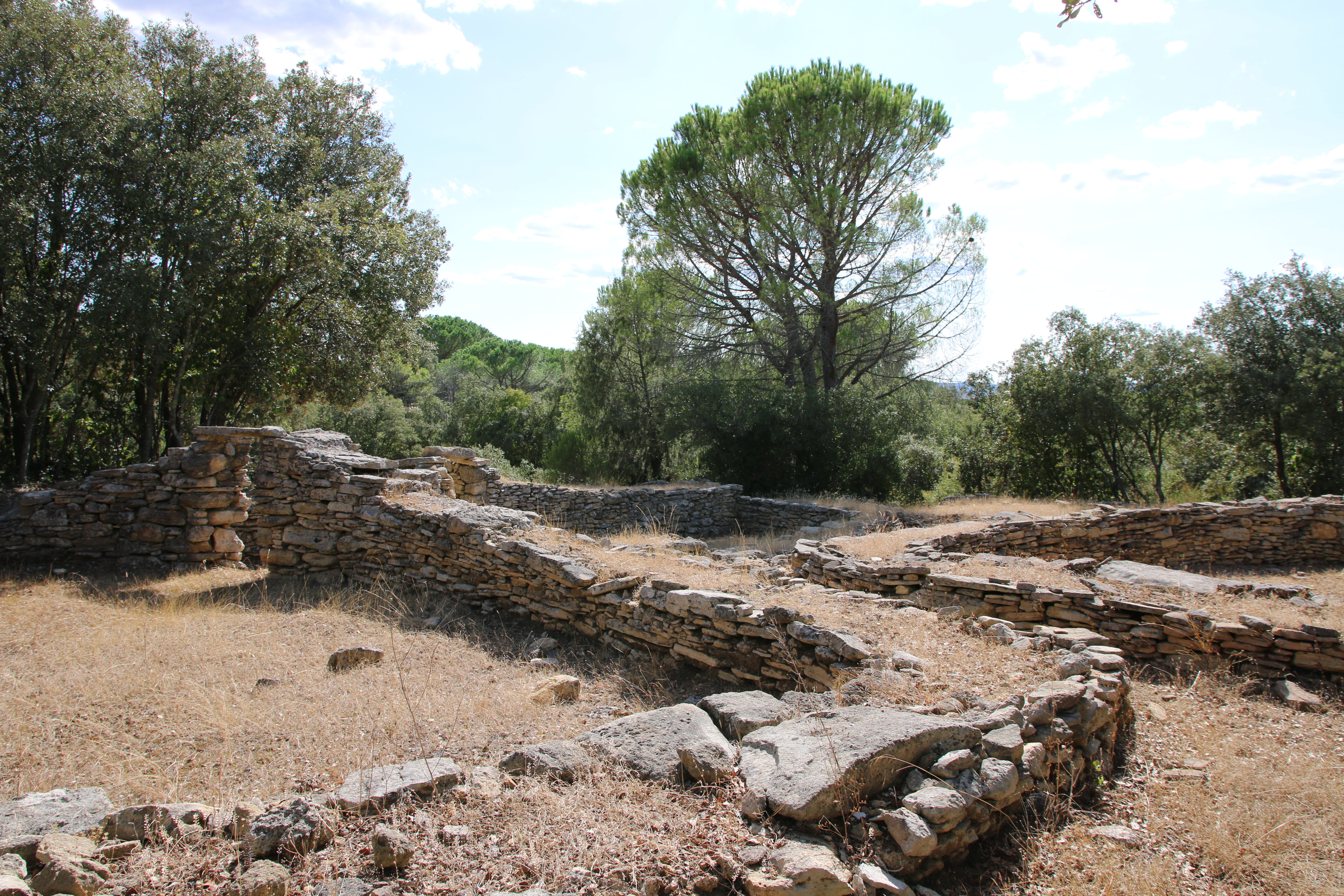 Le Village préhistorique de Fontbouisse est un site préhistorique situé à Villevieille, dans le département du Gard et la région Languedoc-Roussillon.